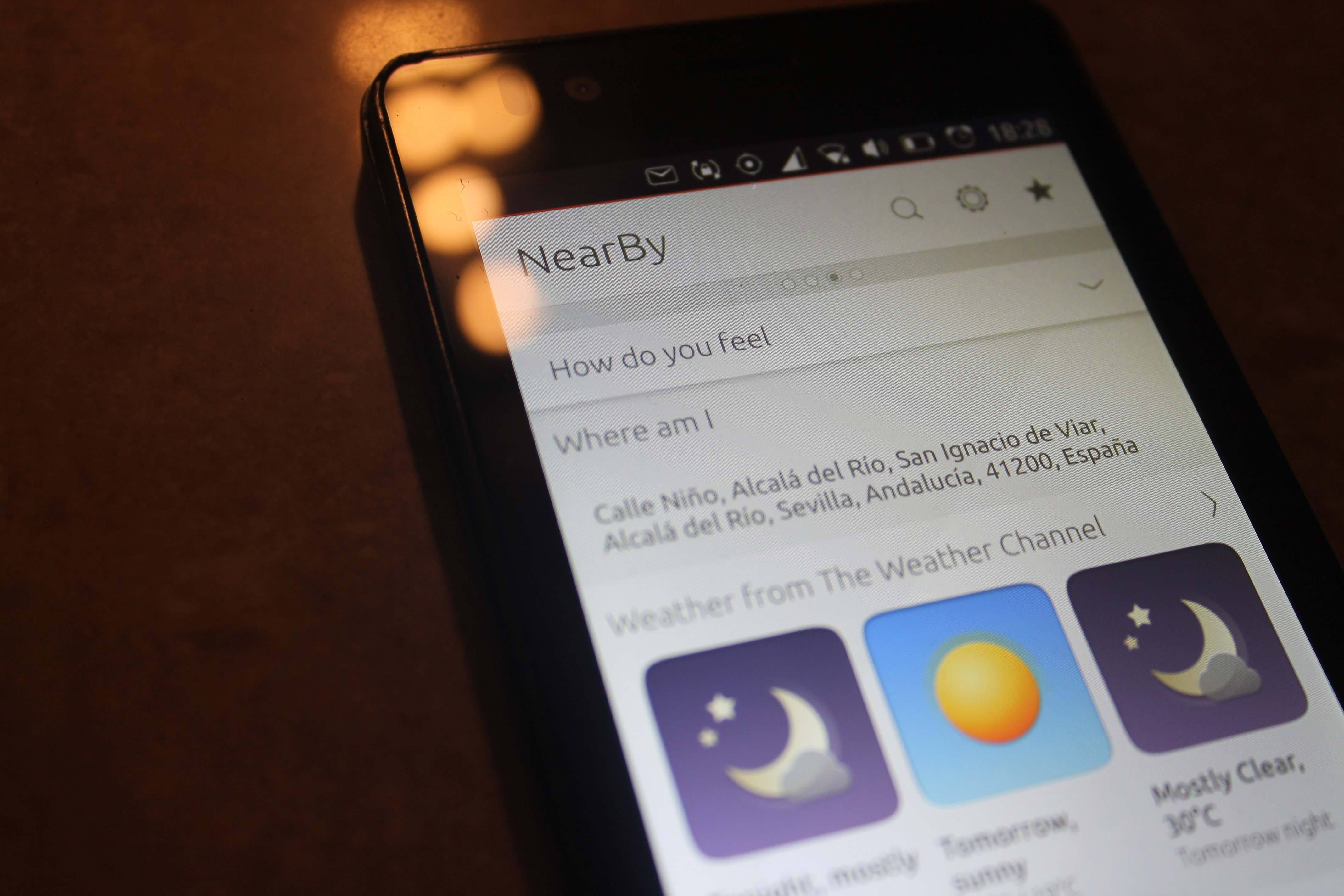 NearBy Scope Ubuntu Phone